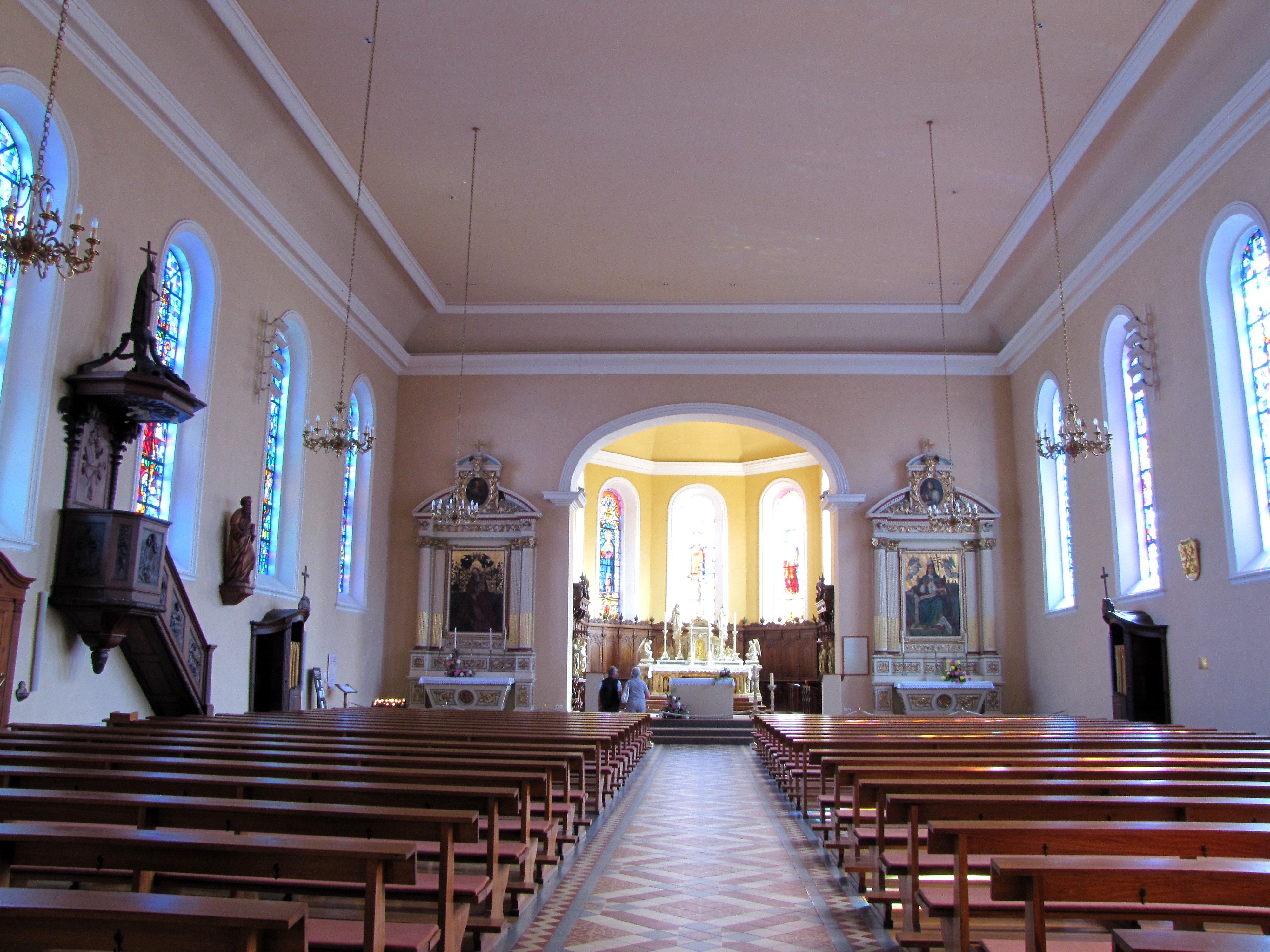 Alsace, Haut-Rhin, Église Saints-Pierre-et-Paul (XIIIe-XIXe) d'Eguisheim (PA00085415, IA68000505): Vue intérieure de la nef vers le chœur.